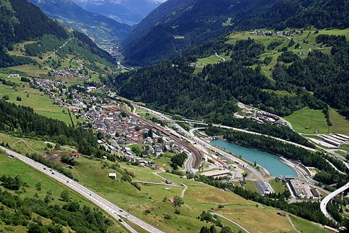 Blick von der alten Gotthard-Passstrasse auf Airolo